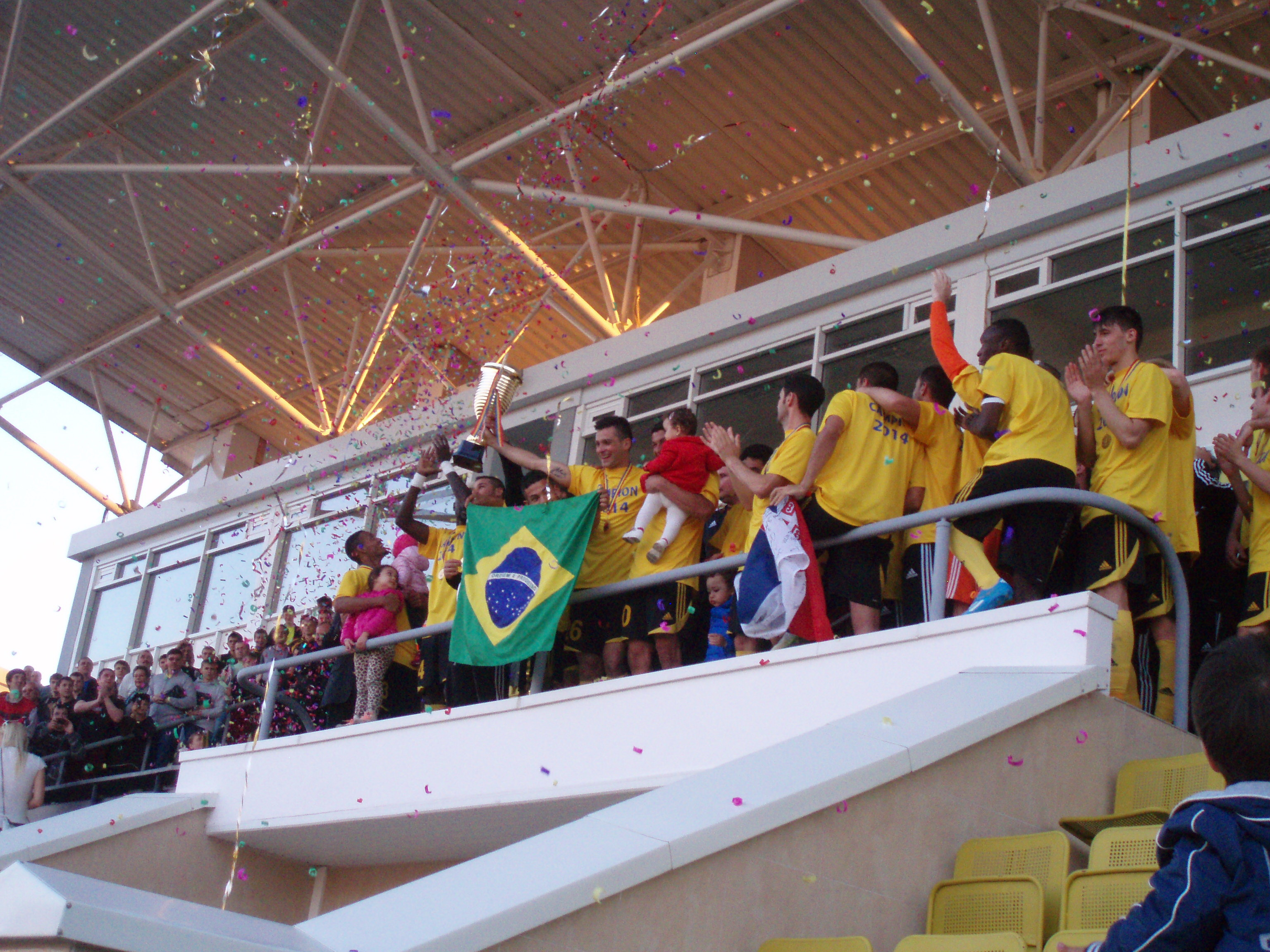 Чемпион Молдовы по футболу 2014 - Шериф